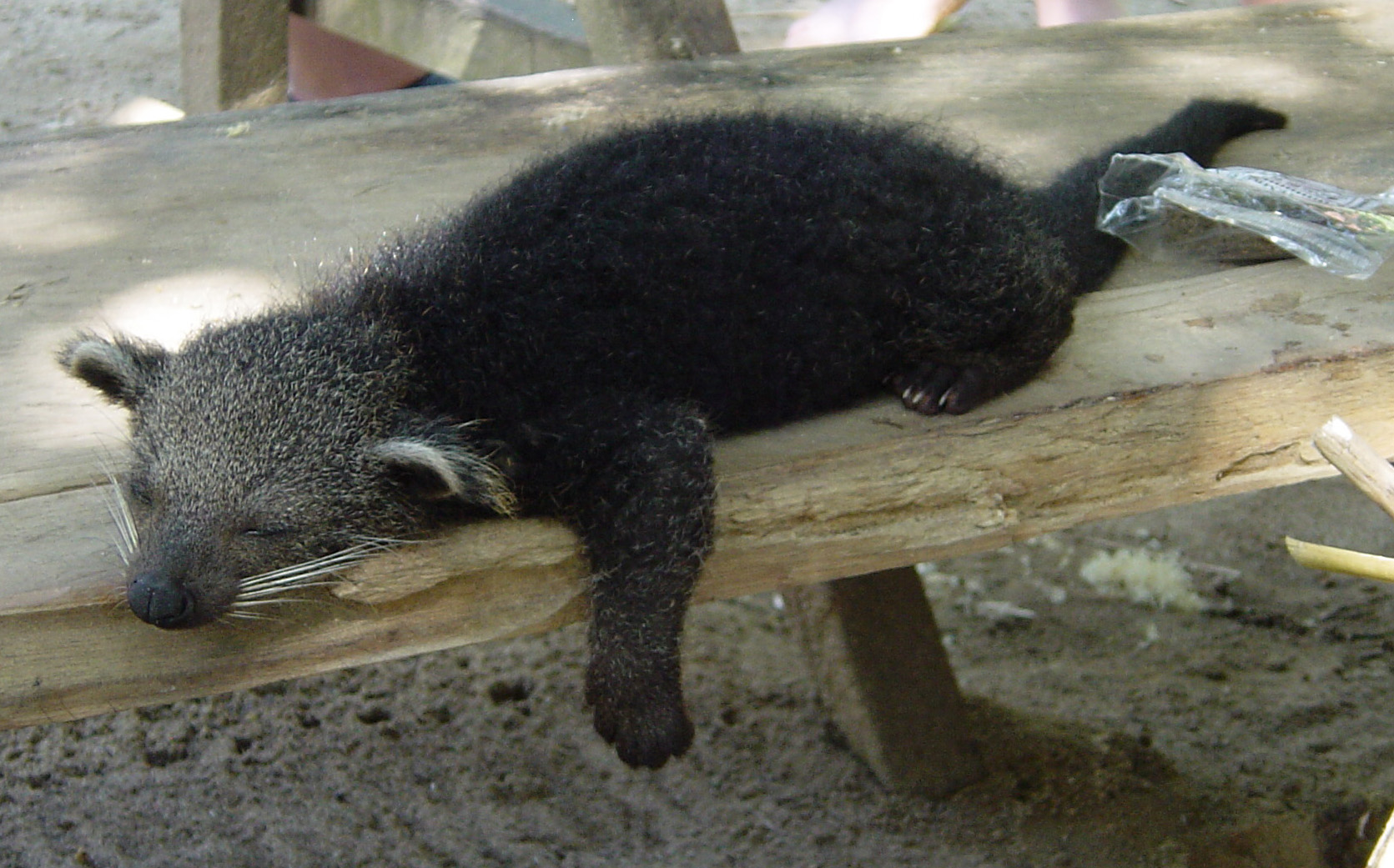 A young bear cat kept as a pet by Orang Asli in Taman Negara (Malaysia)